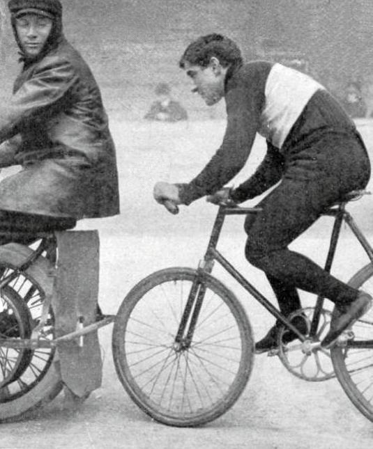 Le stayer Henri Contenet, double recordman mondial de l'heure derrière entraîneur, en 1902 et 1903.